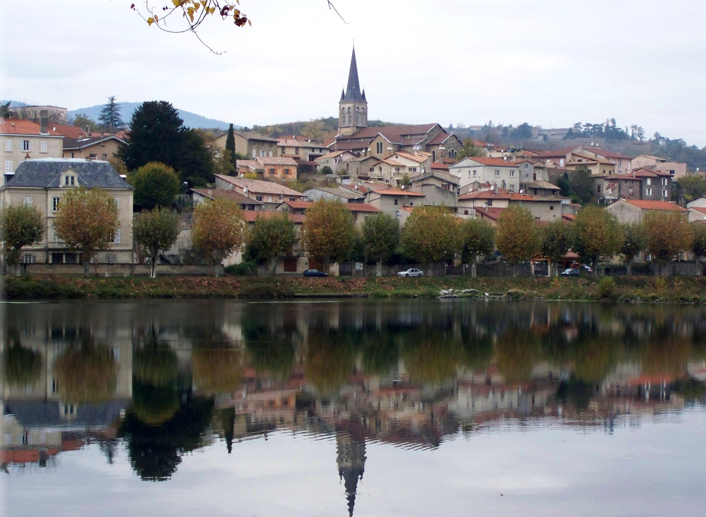 La Commune de Saint-Pierre-de-Boeuf, département de la Loire, France.